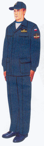 Rysunek ten pochodzi z załącznika do rozporządzenia ministra obrony narodowej z dnia 2 grudnia 2004 r. w sprawie wzorów oraz noszenia umundurowania i oznak wojskowych przez żołnierzy zawodowych i kandydatów na żołnierzy zawodowych.